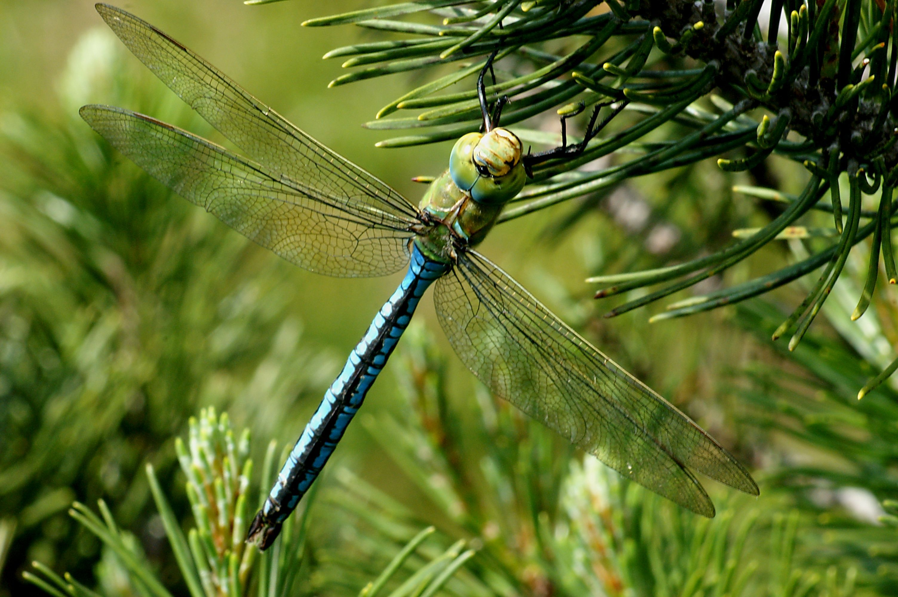 Grosse Königslibellen / Edellibellen